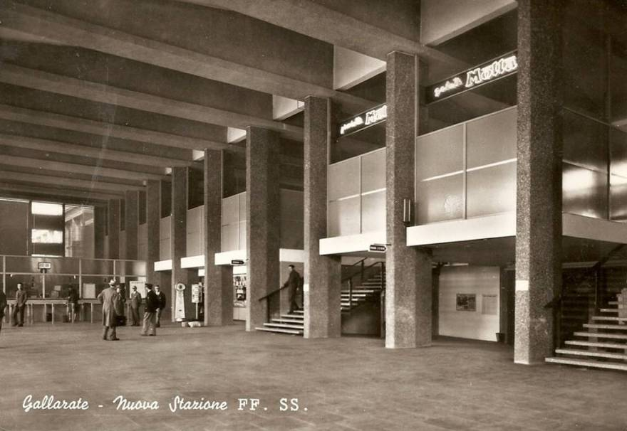 Stazione ferroviaria di Gallarate, atrio interno.